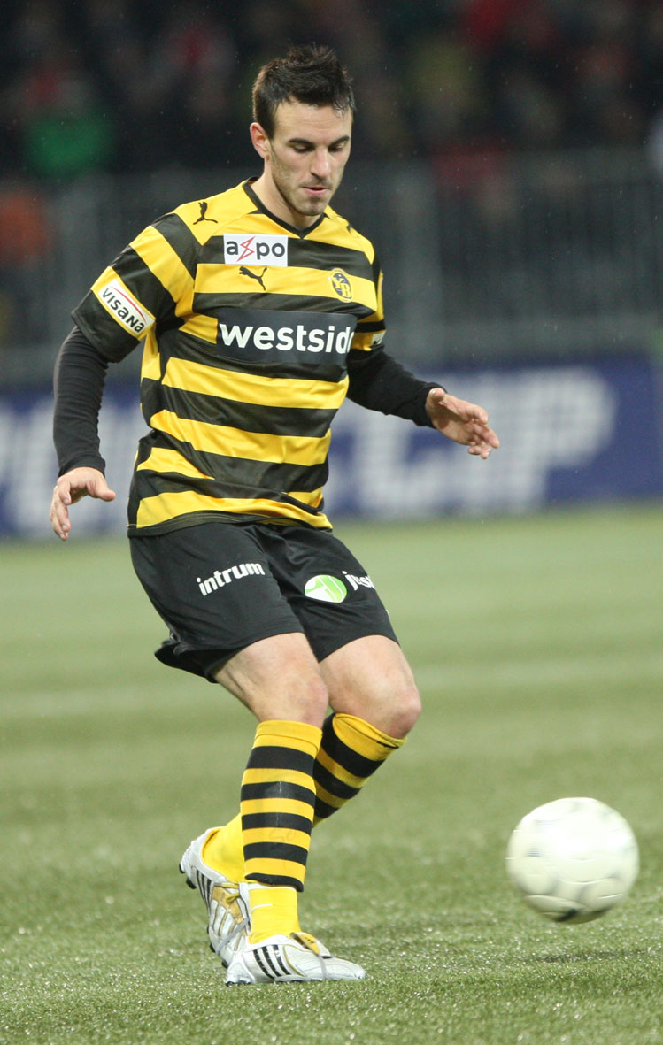 Scott Sutter bei einem Spiel von YB gegen Xamax